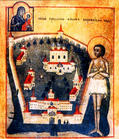 Праведный Иаков Боровичский. Икона XIX в. Новгород.